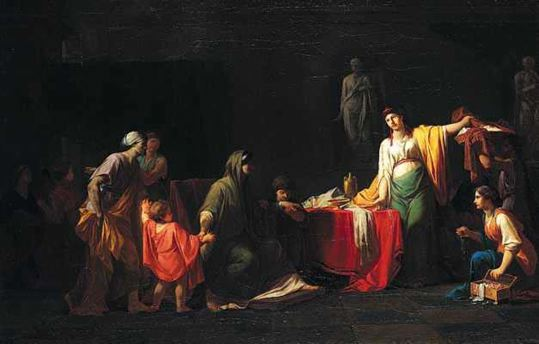 Cornelia, madre dei Gracchi, olio su tela, 54,5 x 84,5 cm, Toulouse, Musée des Augustins